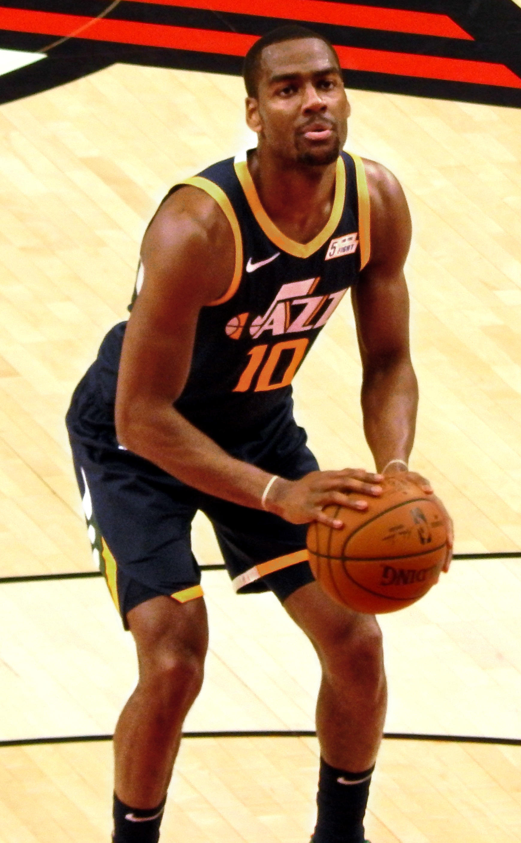 Alec Burks #10 of the Utah Jazz against the Portland Trail Blazers on October 7, 2018 at Moda Center in Portland, Oregon.